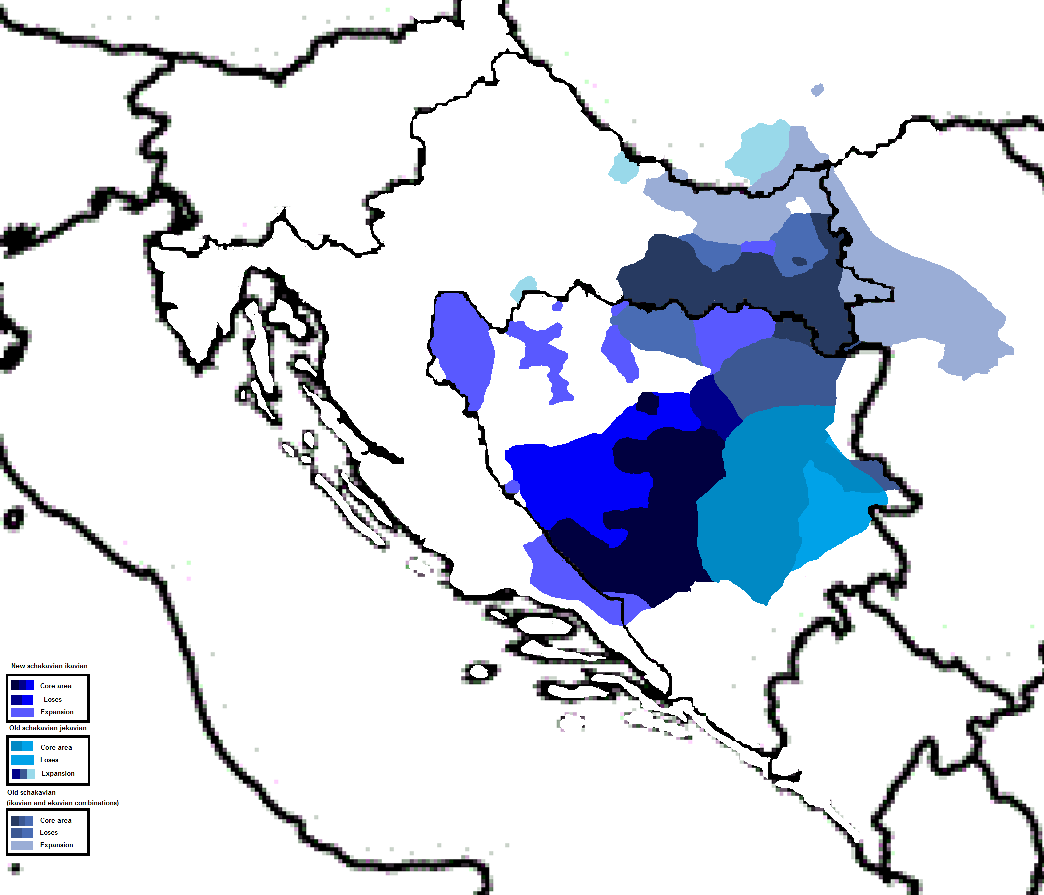 migracije šćakavaca (Šokci, Bošnjaci....) iz regija jezgre oko rijeke Bosne, južne Slavonije i Završja u Podunavlje, Pounje i Podravinu